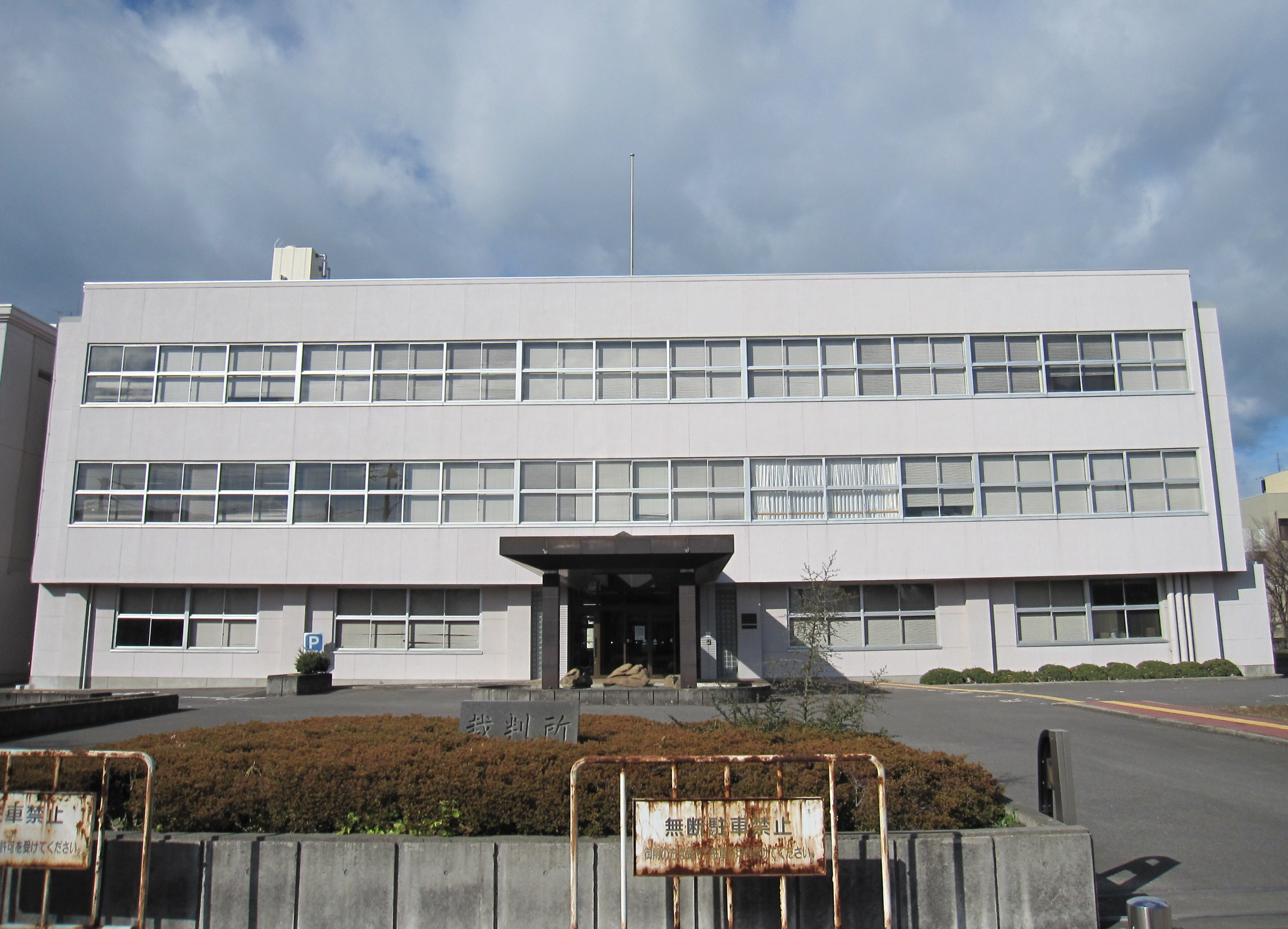 丸亀簡易裁判所